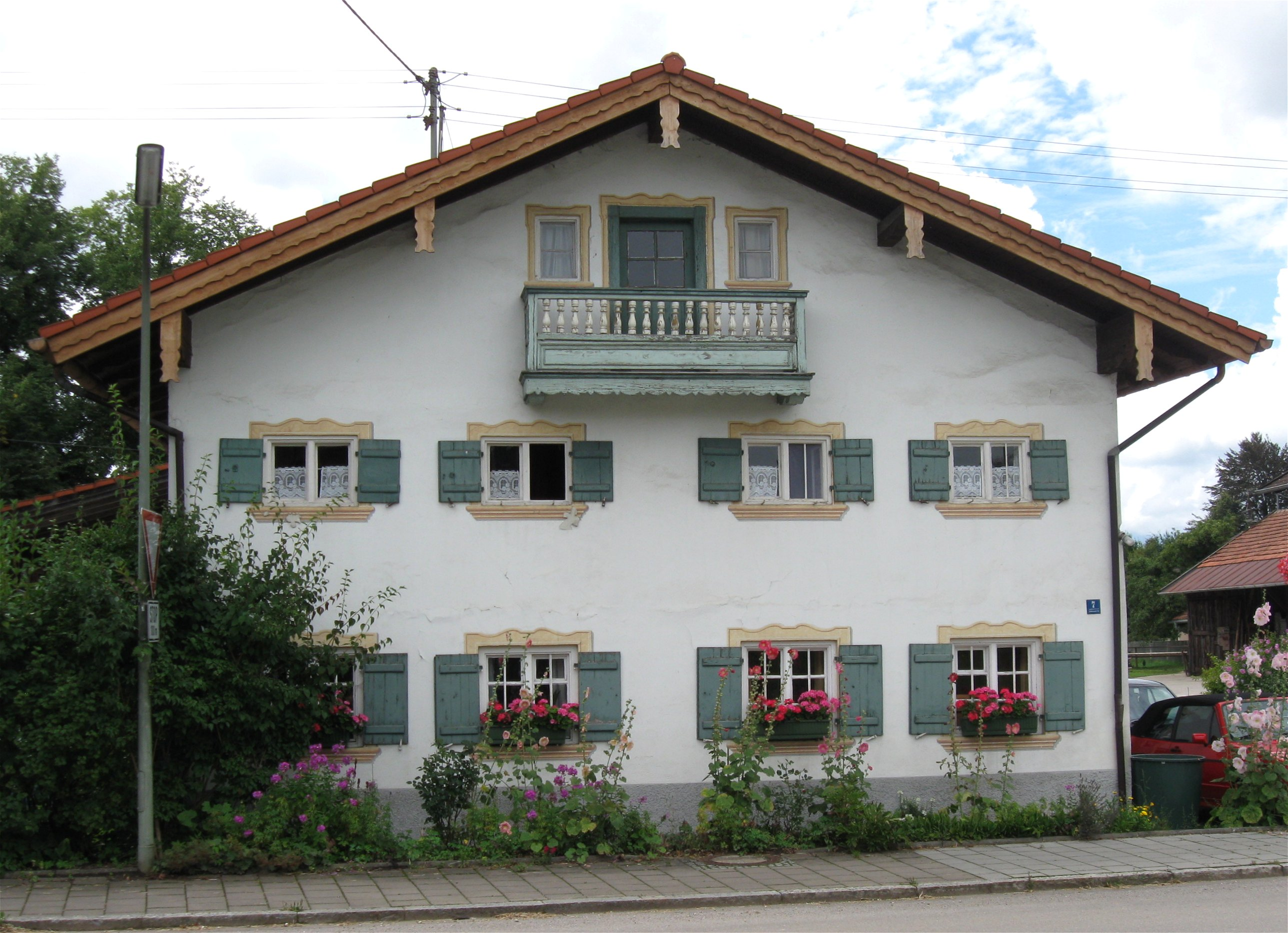 Faistenhaar, Ottobrunner Straße 7; Beim Metzger, Bauernhaus, Einfirstanlage, Wohnteil verputzt, mit Giebelbalkon und traufseitigem Balustersöller, Anfang 19. Jahrhundert.